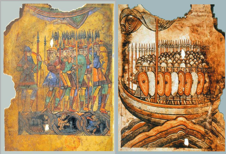 folio 7v, "s. aubin défendant guérande" & folio 7r "flotte normande"